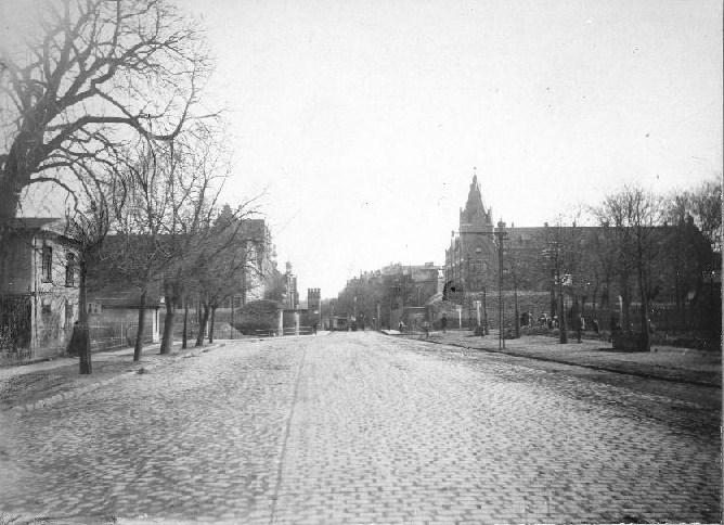 Nieistniejąca Brama Nowych Ogrodów w Gdańsku, na granicy dzielnic Siedlce i Śródmieście. Na pierwszym planie ulica Kartuska, widok w kierunku centrum miasta.